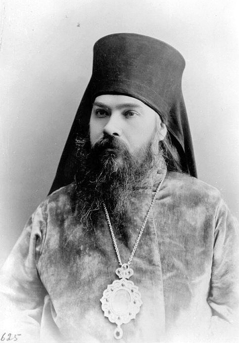 Амвросий (Гудко), еп. Сарапульский